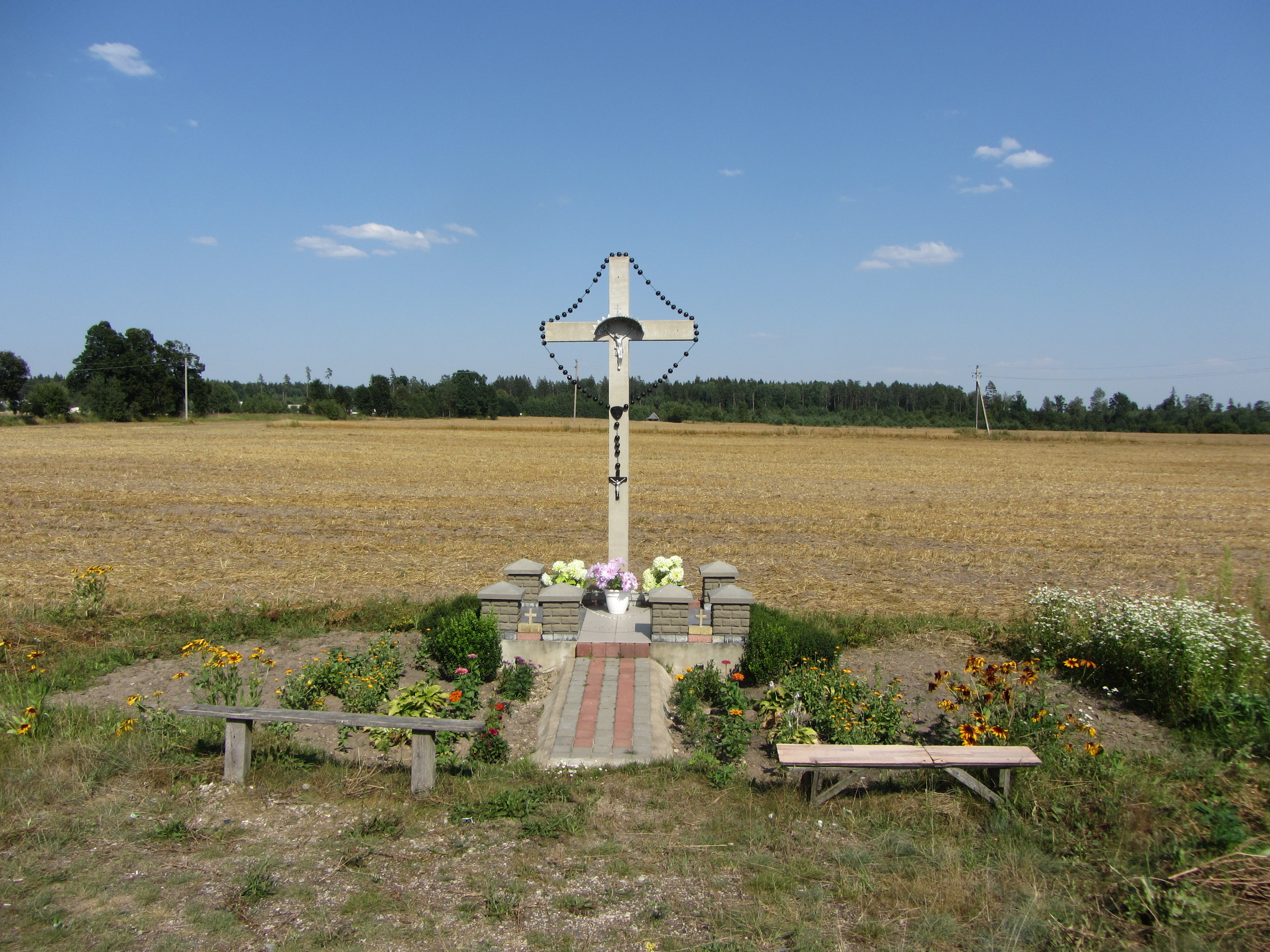 Karalina 17127, Lithuania